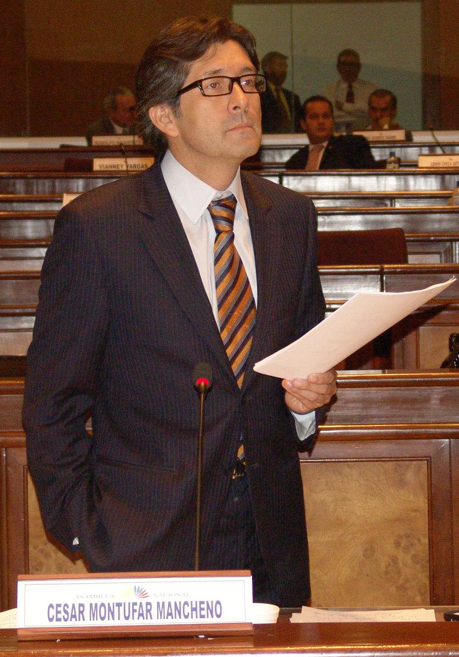 Asambleísta Cesar Montufar interviene sobre la Ley de Educación Superior